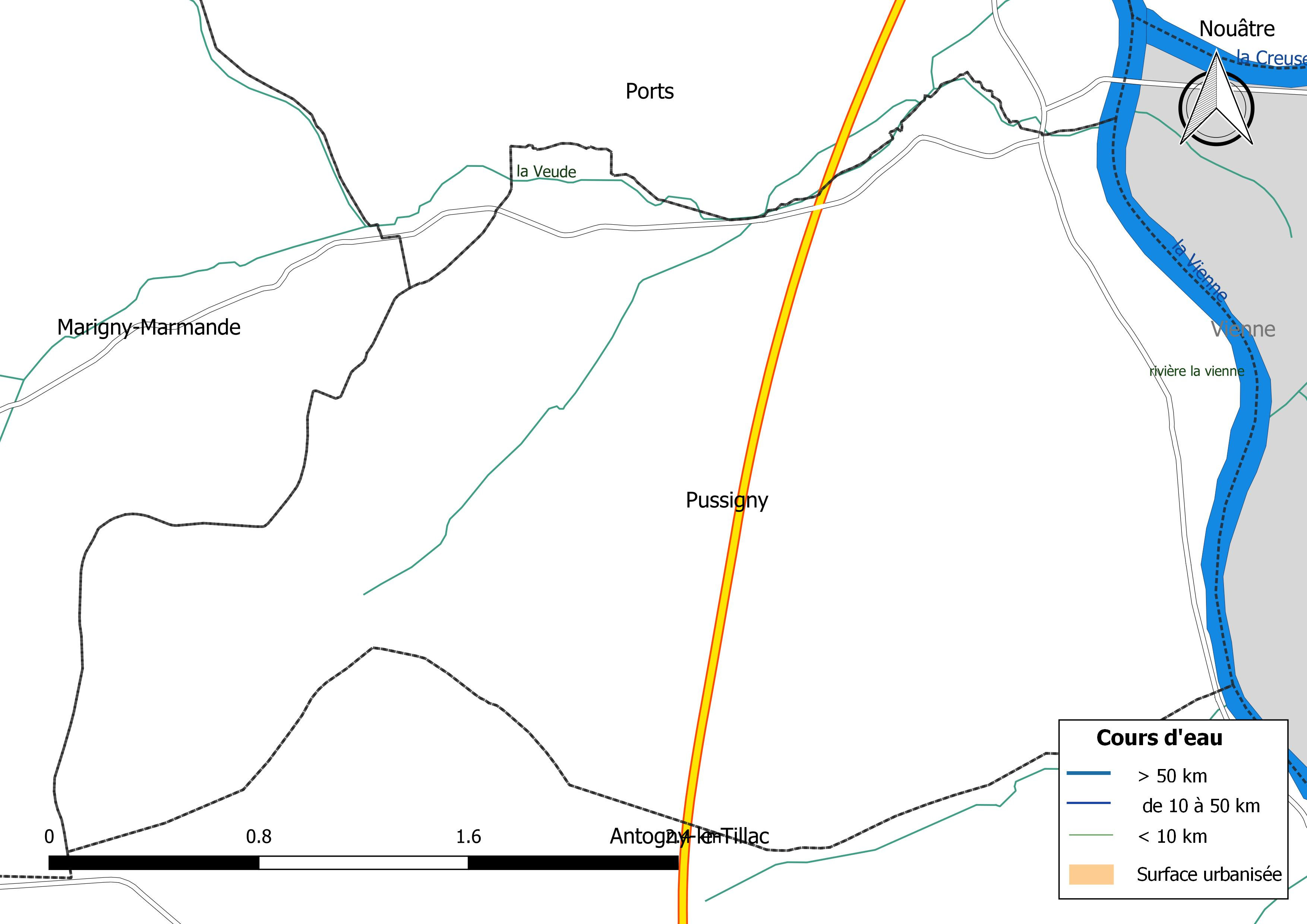 Carte du réseau hydrographique de la commune de Pussigny (France).